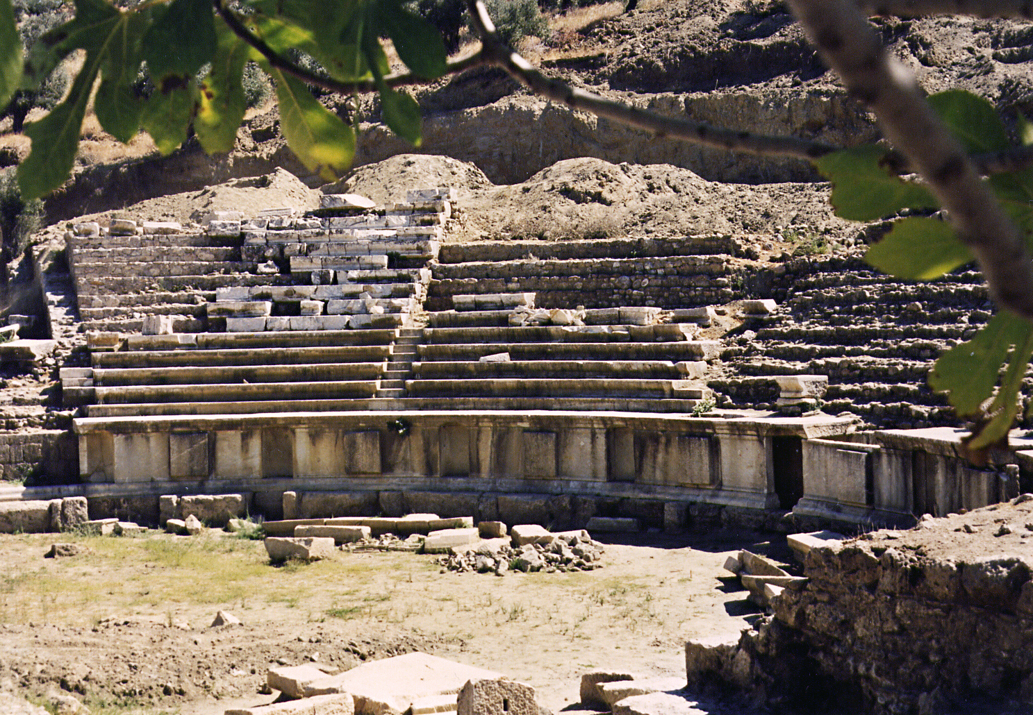 Magnesia am Mäander, Westtürkei, Theater